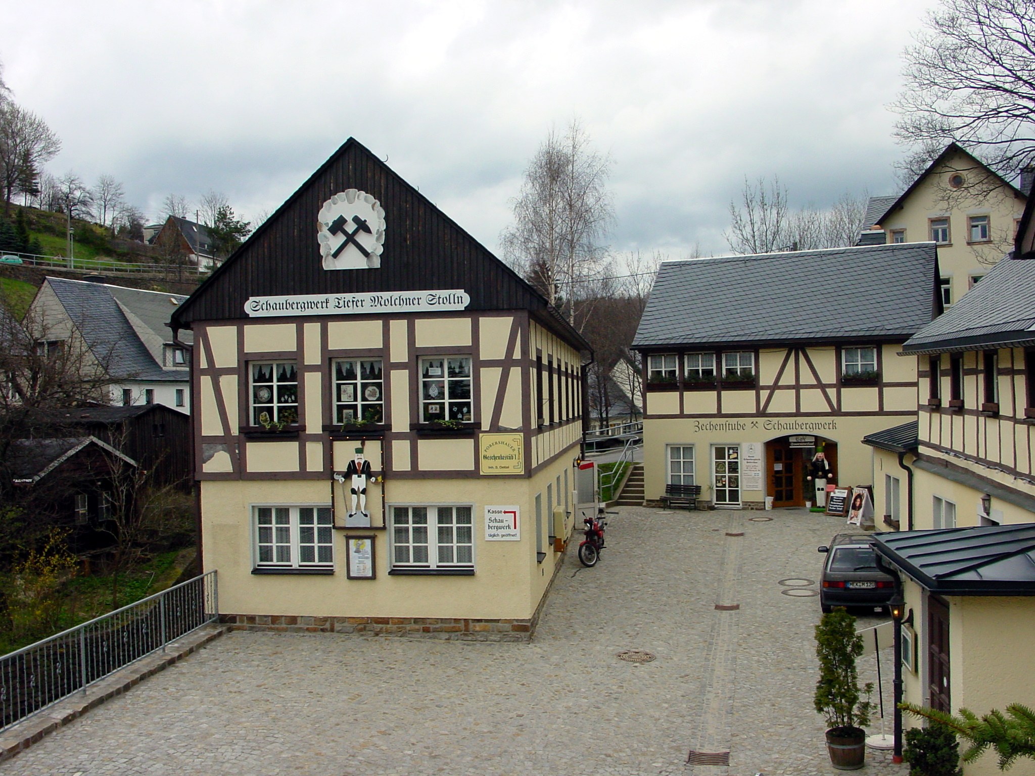 Besucherbergwerk "Tiefer Molchner Stolln" in Pobershau (übertägige Anlagen) (foto by geme)